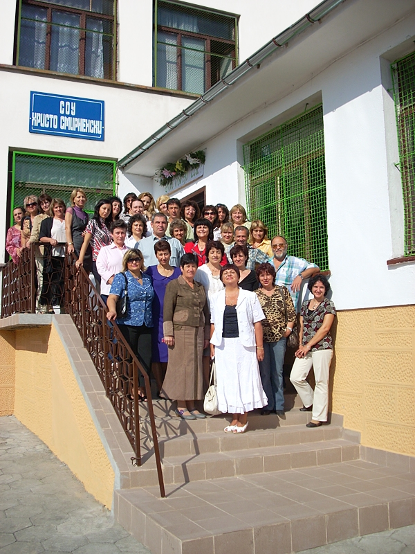 Учителският екип на СОУ "Христо Смирненски", гр. Стара Загора, за учебната 2010-2011 г.